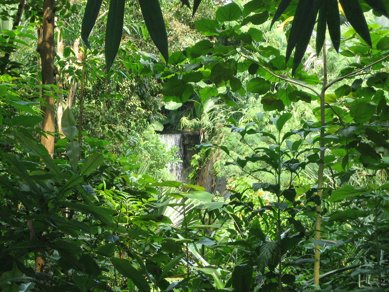 Wasserfalls in der Masoalahalle